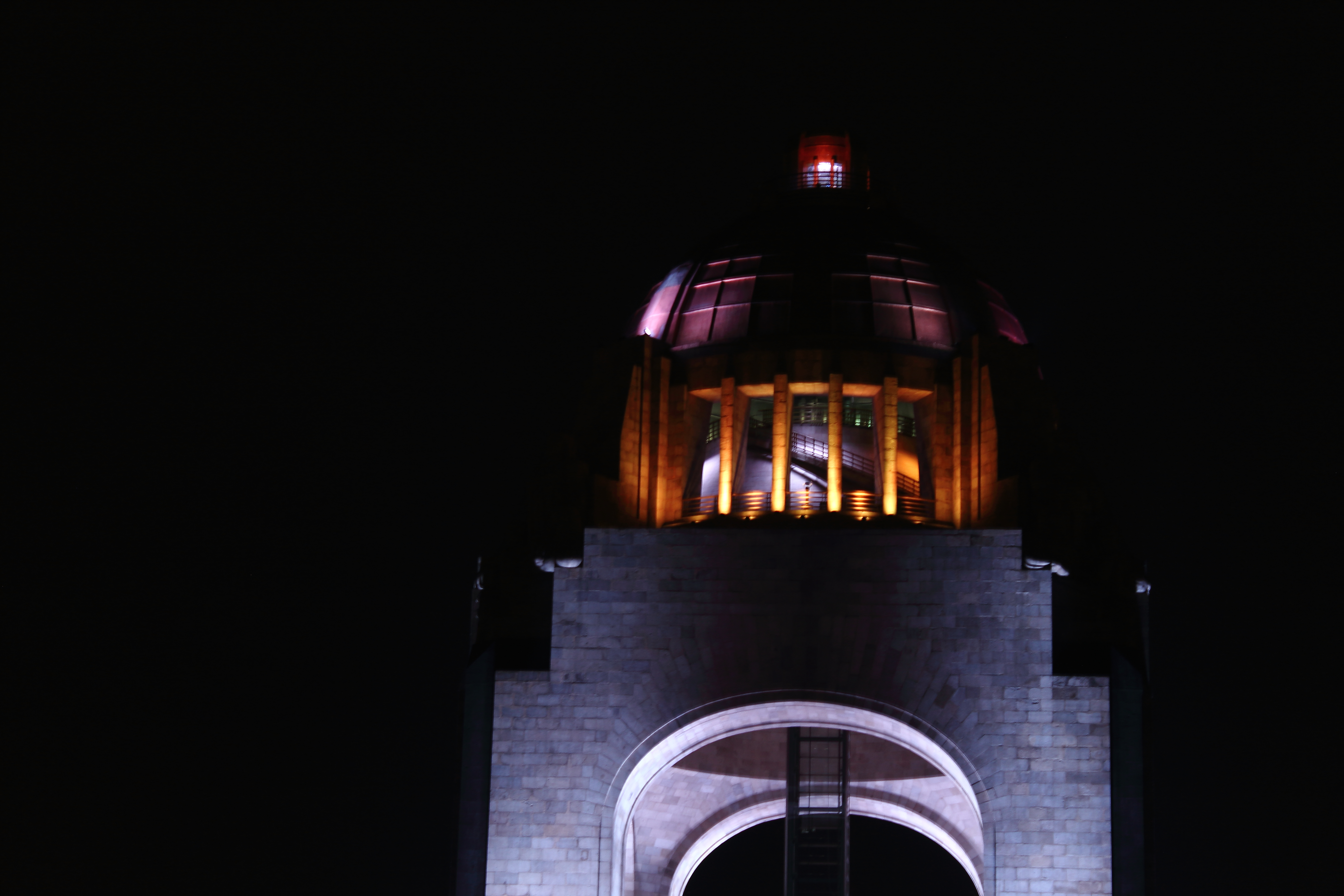 Monumento a la Revolución por la noche.